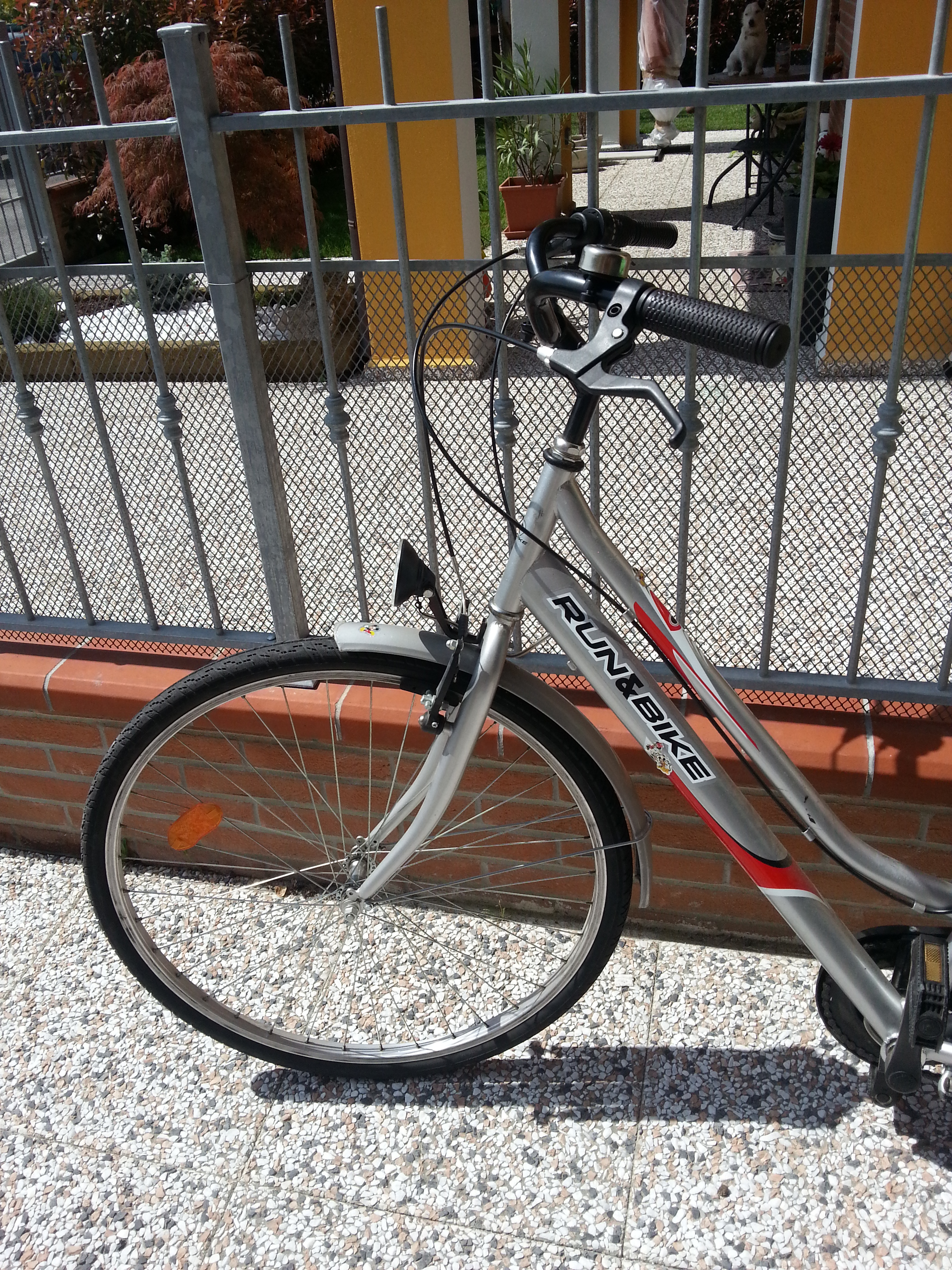 gettata